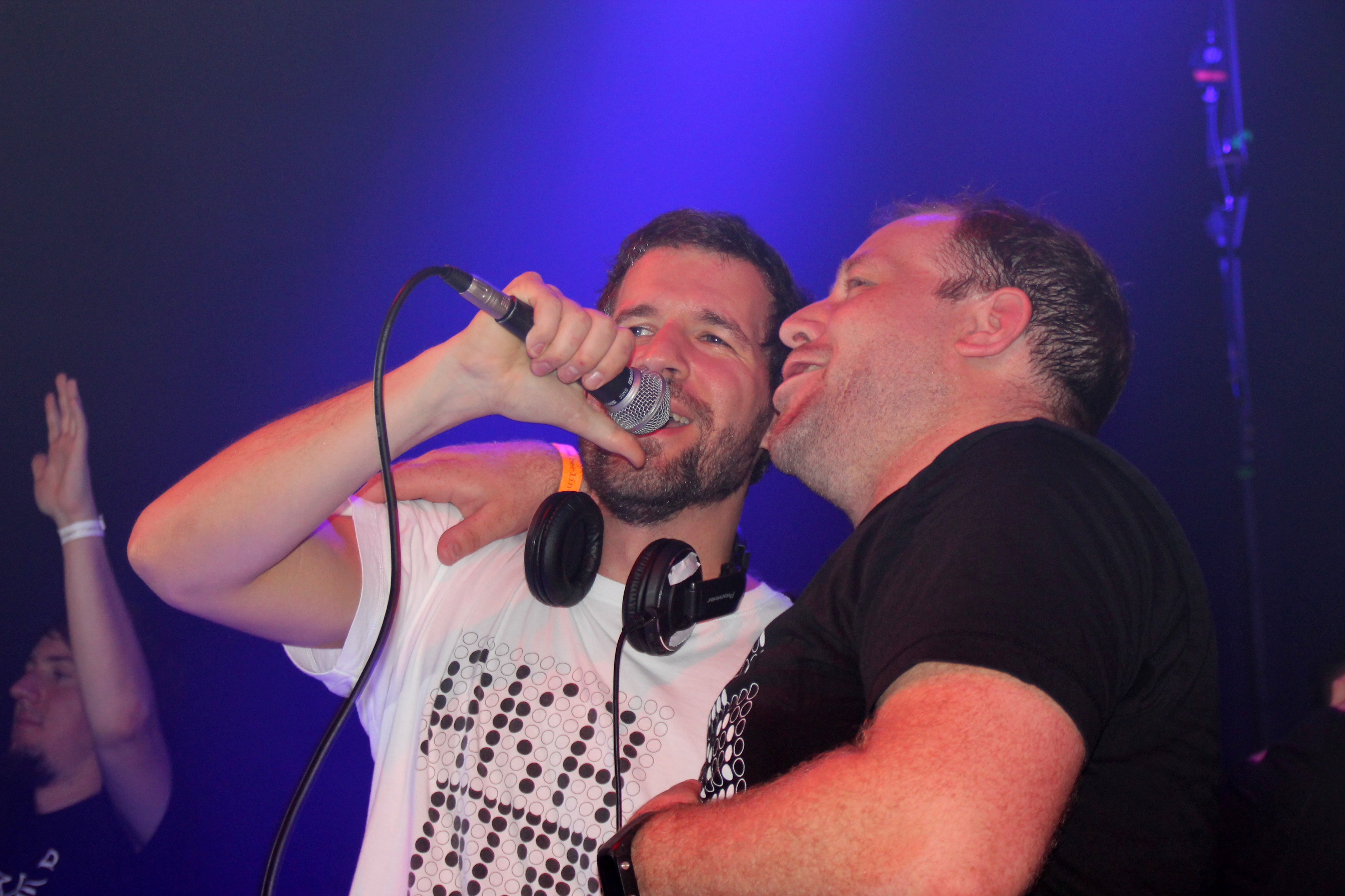 AKA AKA bei einem Live-DJ-Set auf dem Berlin Summer Rave 2015 am 13./14.06.2015 auf dem Ehemaligen Flughafen Tempelhof